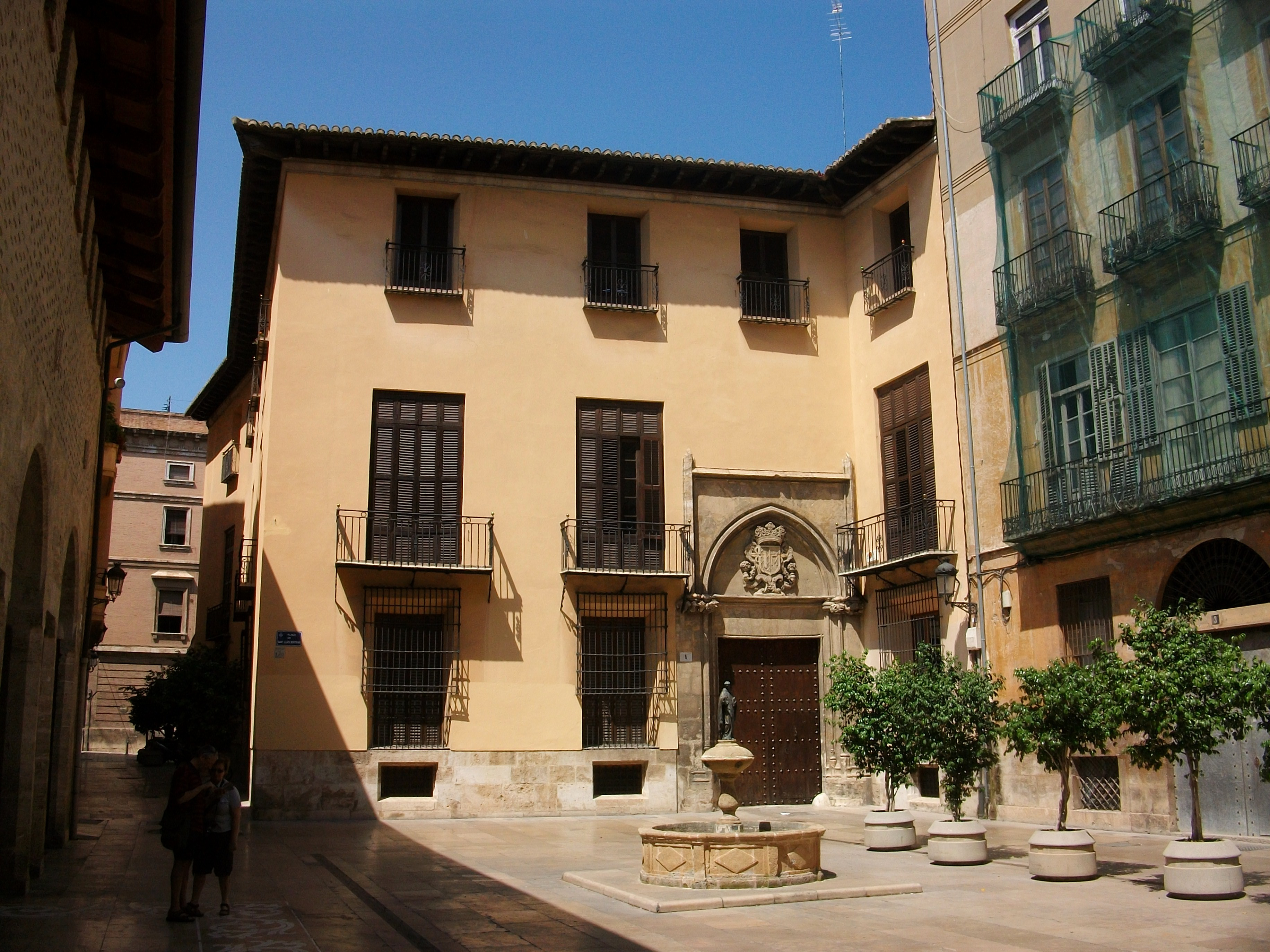 Plaça de sant Lluís Bertran de València, l'Almodí a l'esquerra, davant el palau dels Escrivà i a la dreta la casa natal de Lluís Bertran.